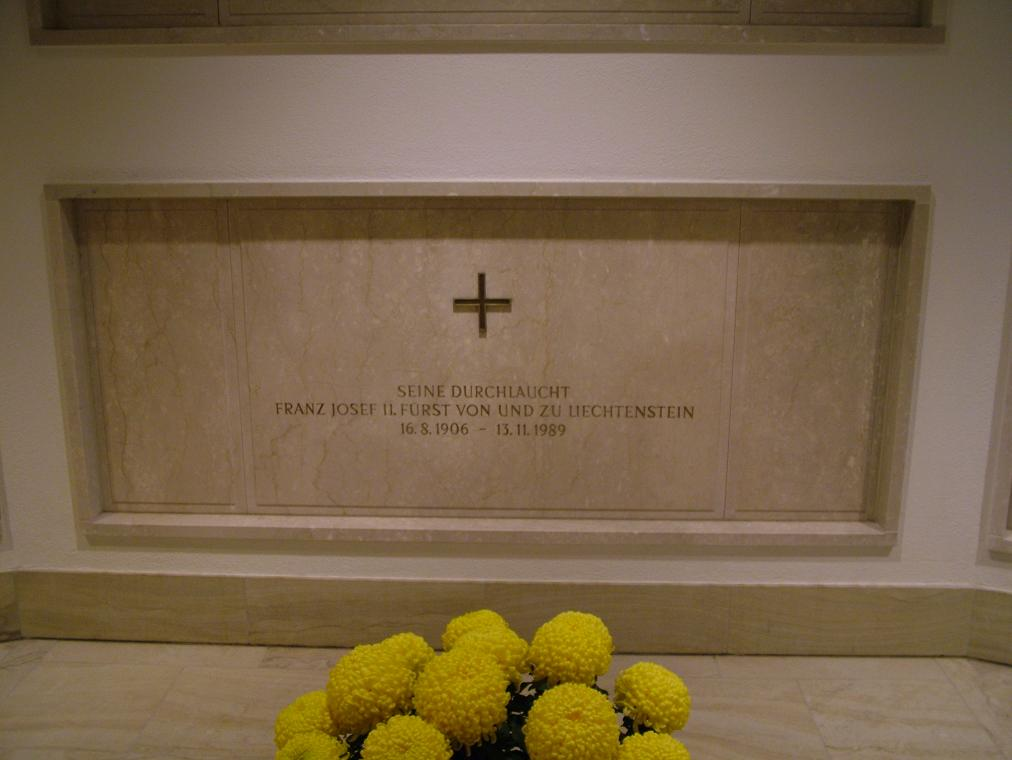 Fürstengruft